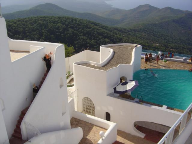 Hôtel El Mountazah (Ex-Hôtel du rocher, Seraidi, Annaba)